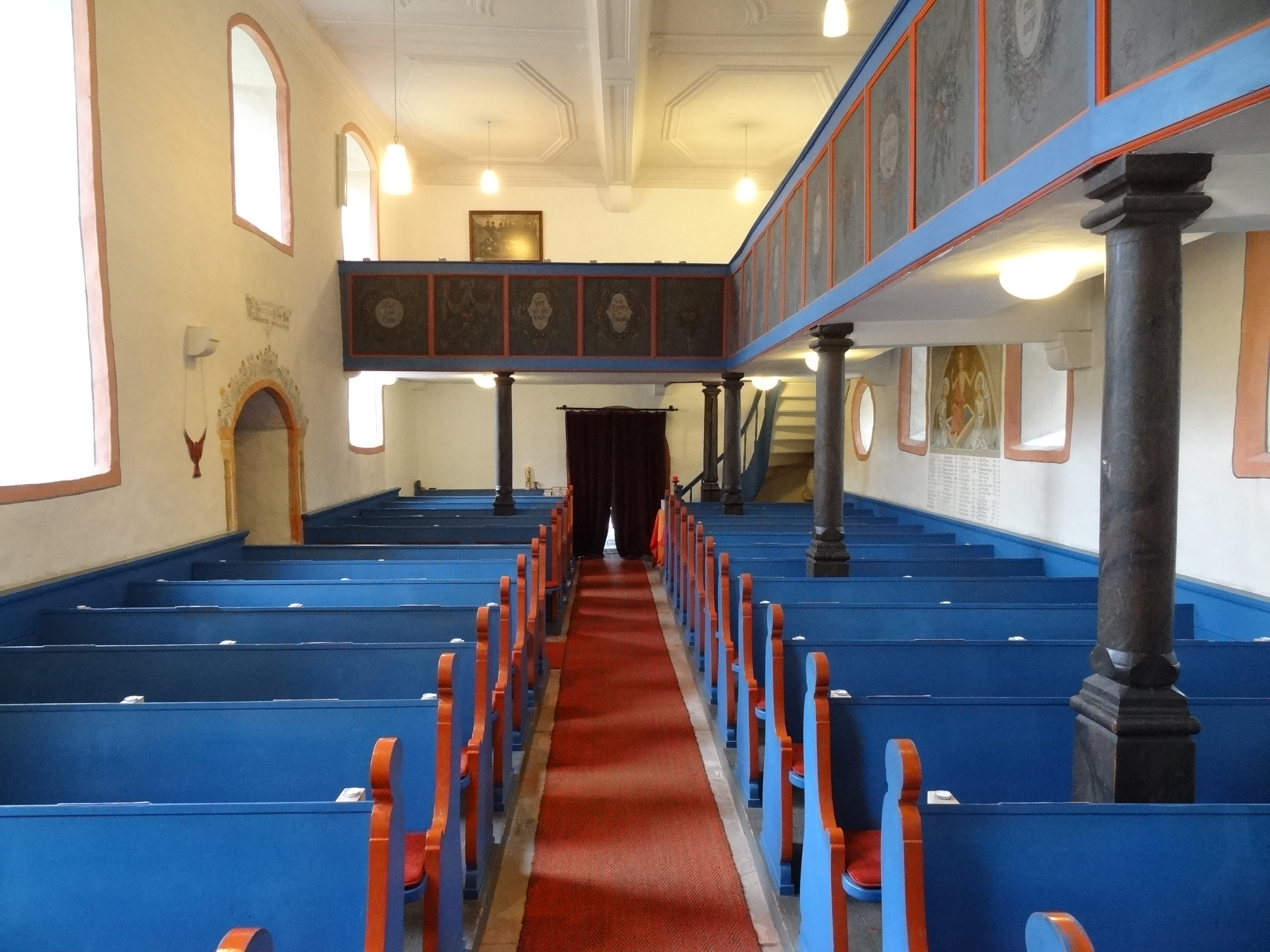 Evangelische Pfarrkirche (Schwickartshausen)